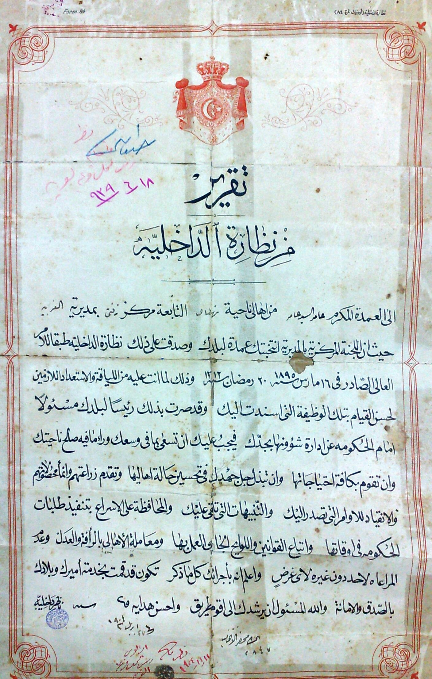 صك عمودية مصري قديم